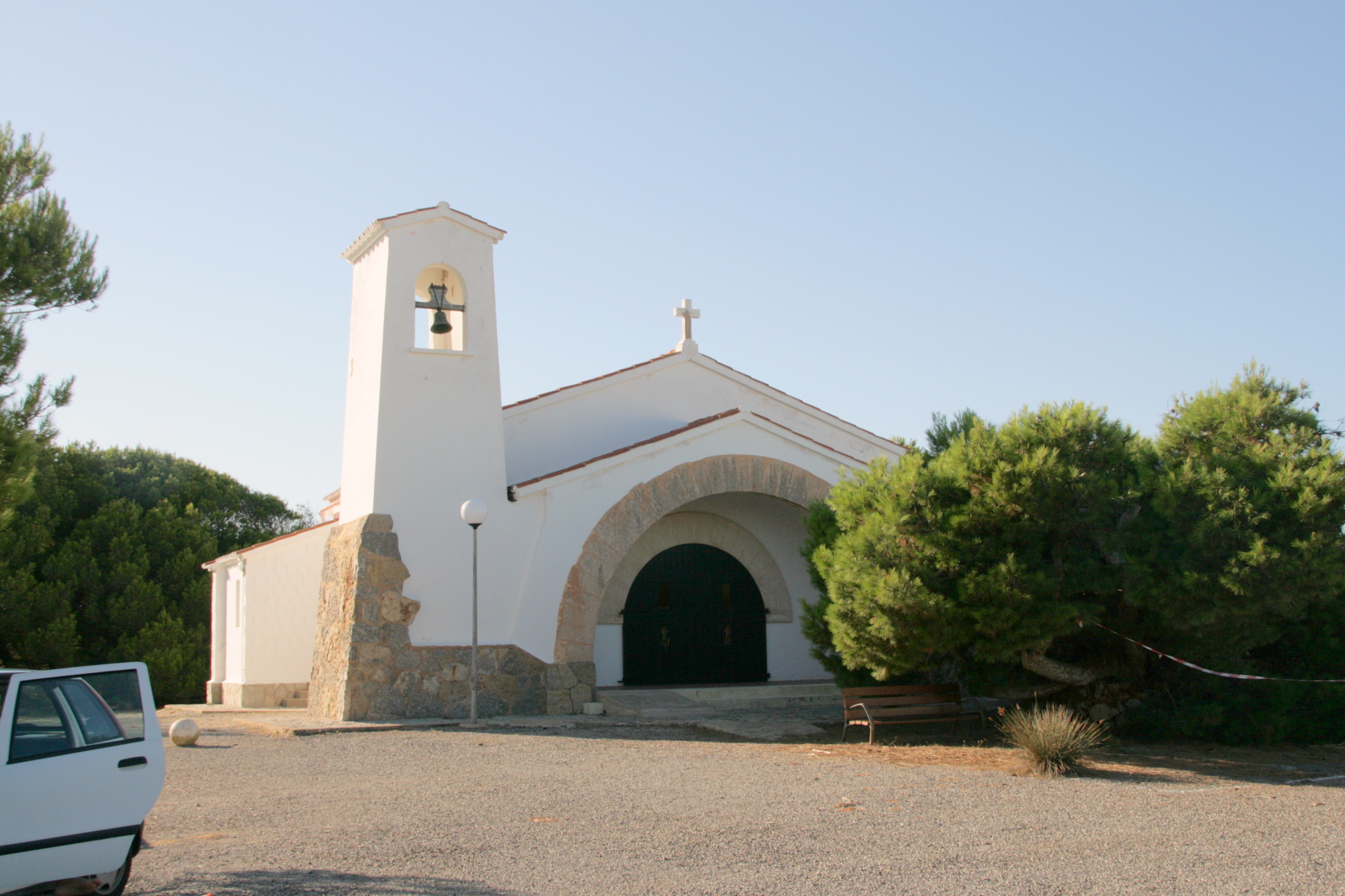 Iglesia de Na Macaret